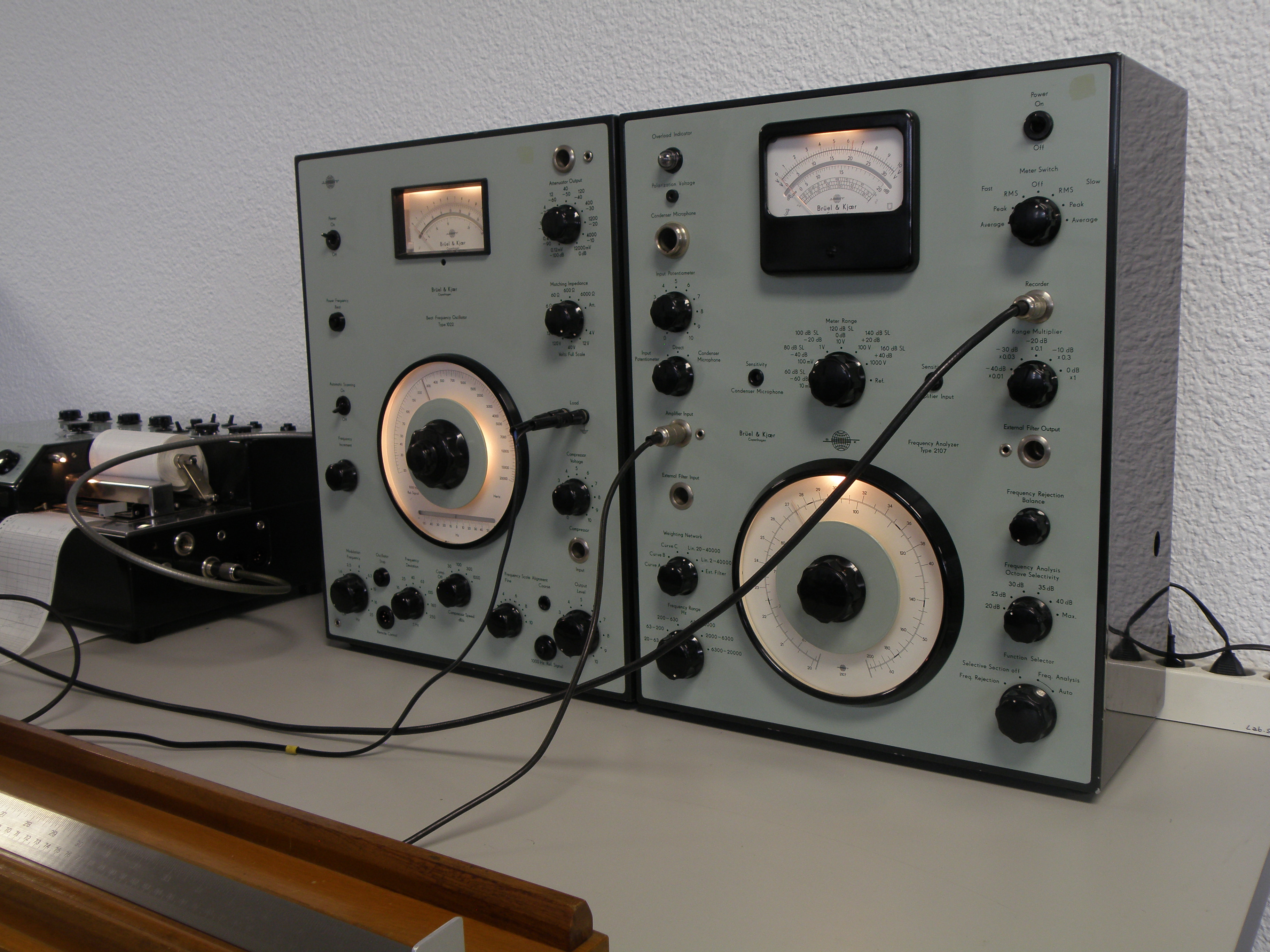 Generadores de onda correspondientes al montaje del Tubo de Kundt. Articulo completo: Tubo de Kundt